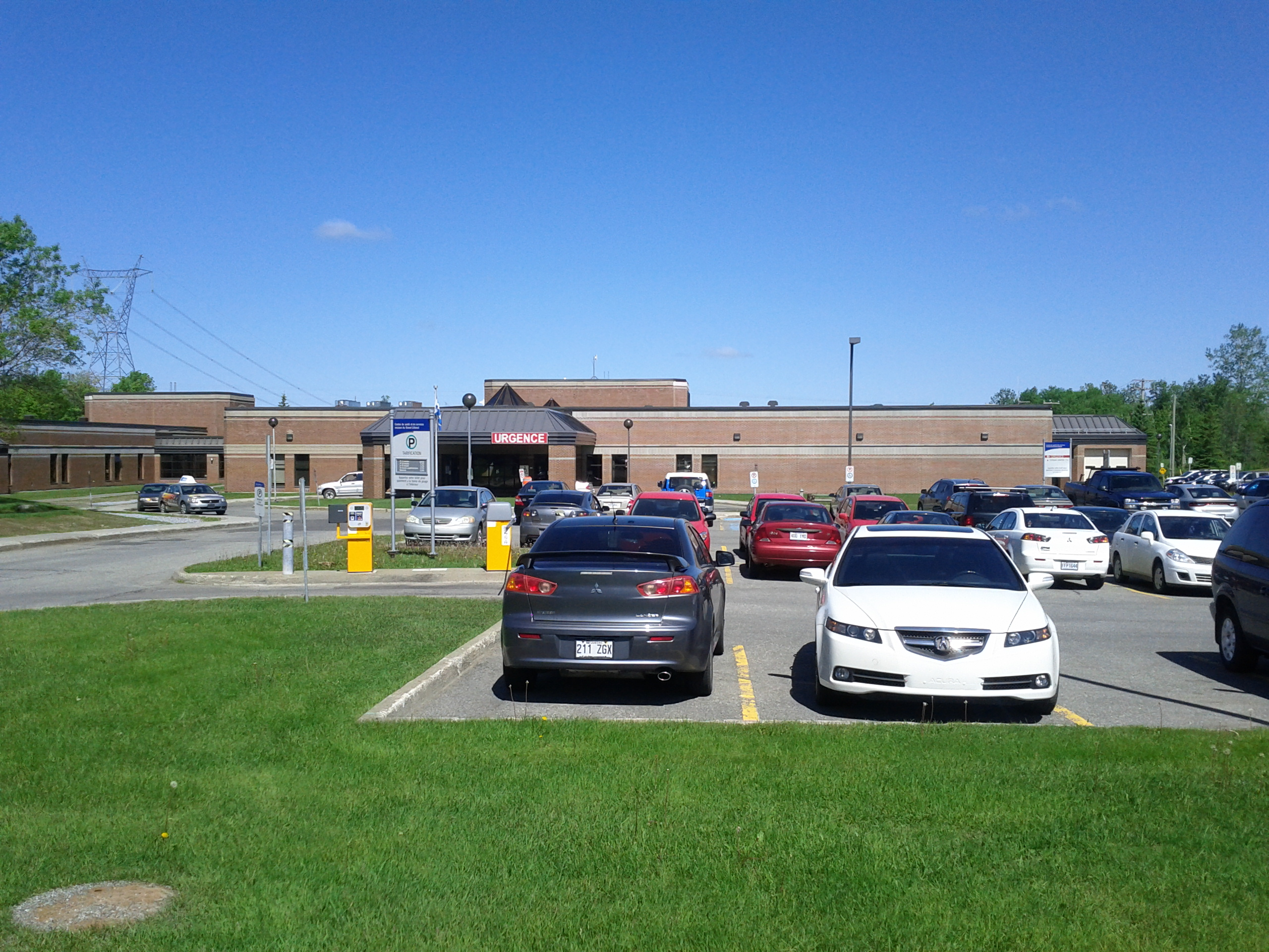 Centre hospitalier Paul-Gilbert dans le quartier Charny de la ville de Lévis, au Québec.